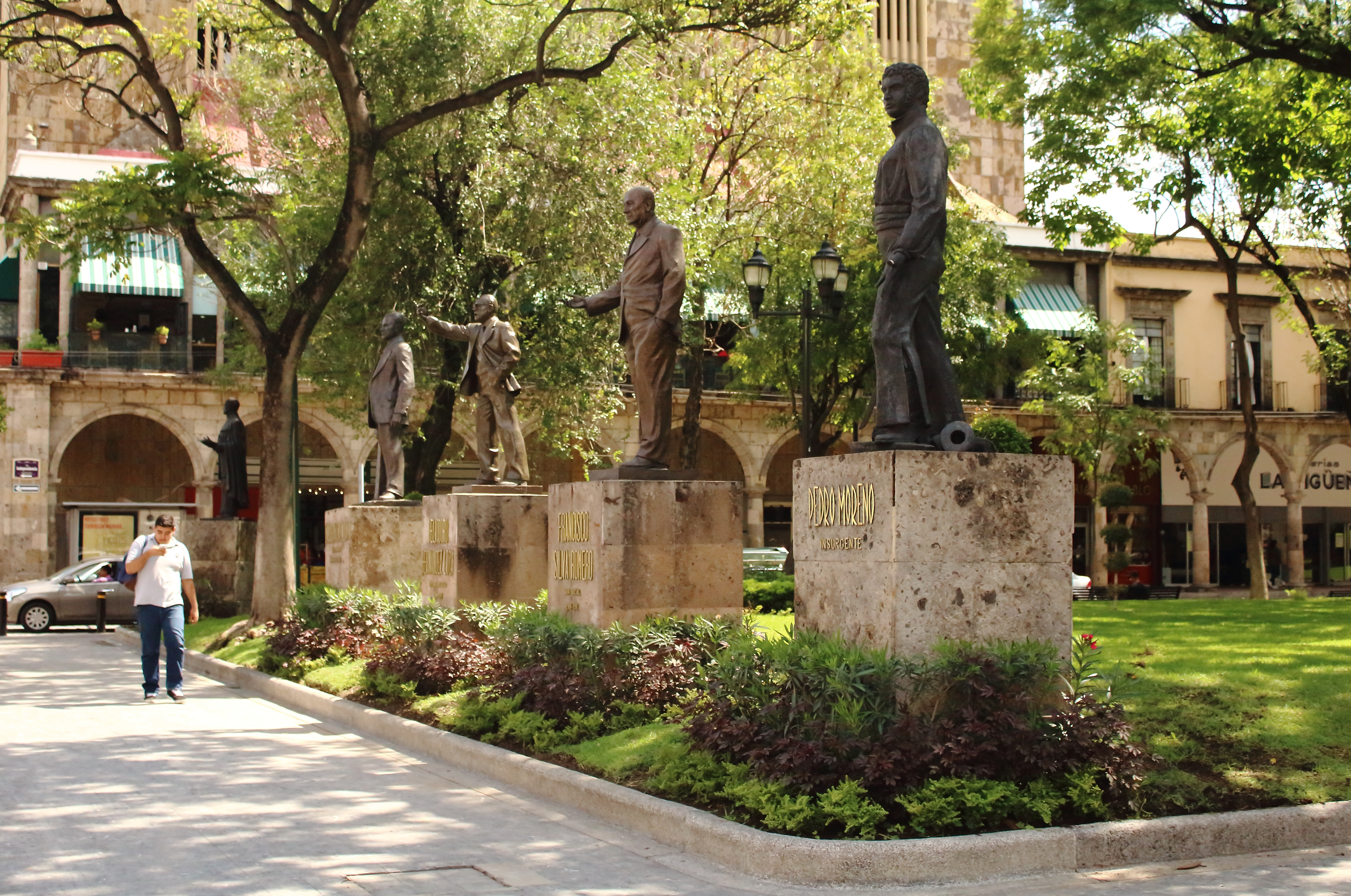 Esculturas de la Rotonda de los Hombres Ilustres en Guadalajara, Jalisco, México.